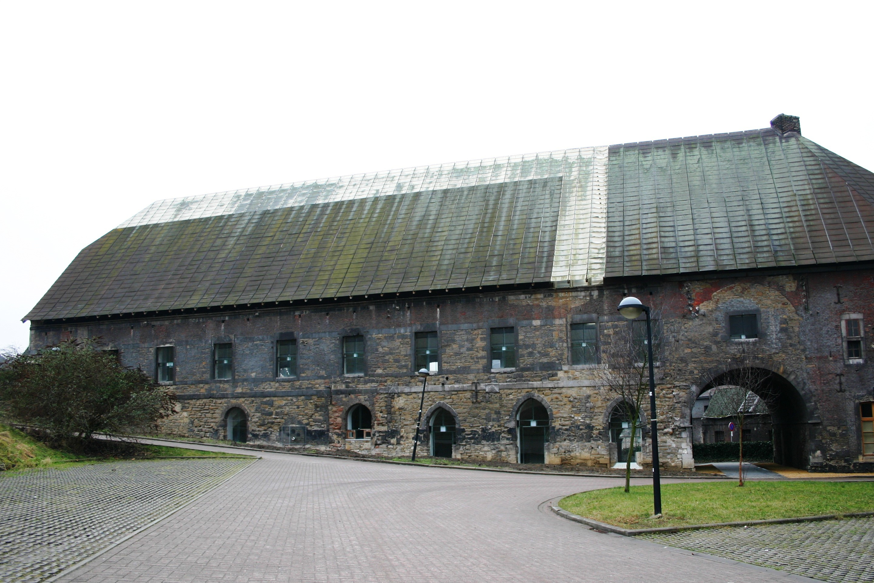 Déi al Abtei Val Saint-Lambert.